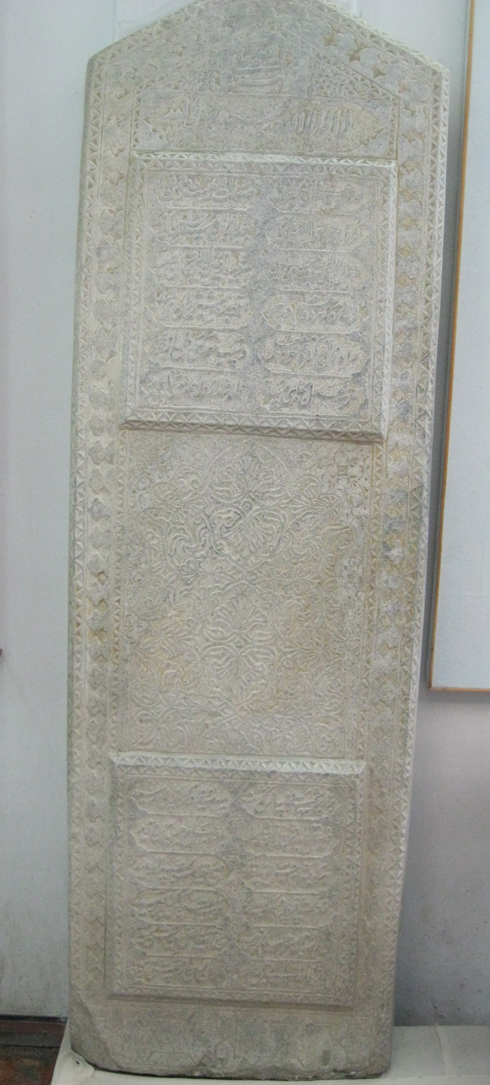 Надгробный камень бухарского правителя Мухаммад Рахимбия